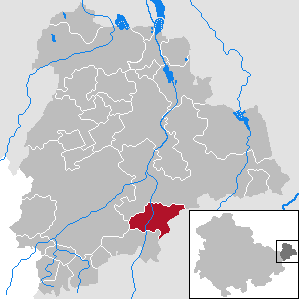 Gößnitz in Thuringia - District Altenburger Land